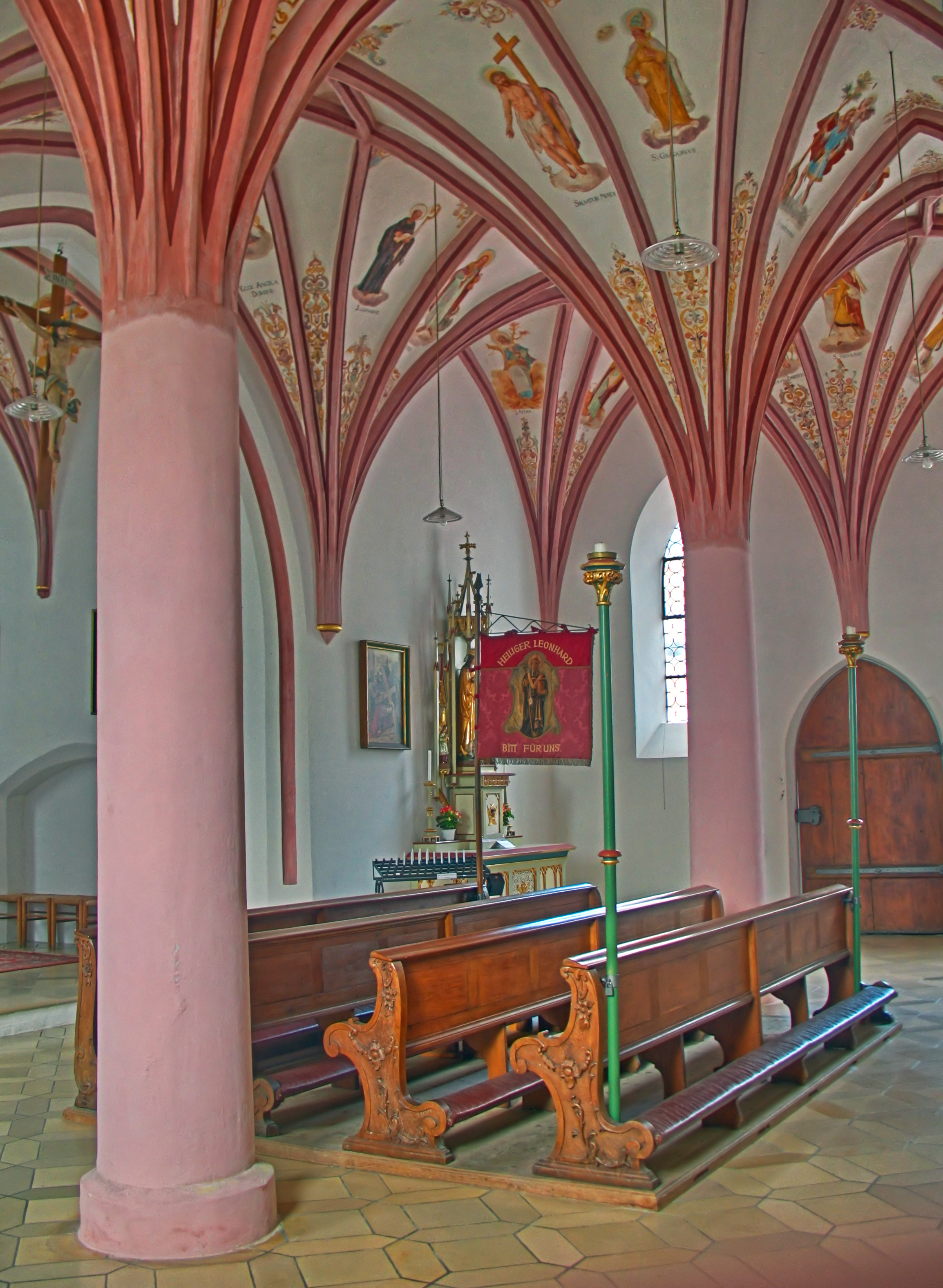 Deutschland, Bayern, Fürstenfeldbruck, Kirche St. Leonhard, Innenraum, HDR-Bild